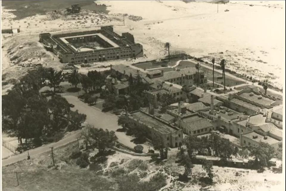 Vista aerea trasera del Hotel Playa de Ensenada (Ensenada, Baja California Mexico,1930), hoy conocido como Riviera del Pacifico, al lado izquierdo se observa la construcción preliminar de lo que podria haber sido la casa del boxeador Jack Dempsey